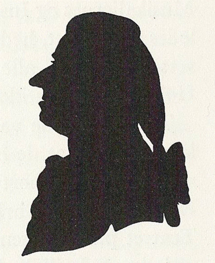 Silhuetklip af Johann Hartmann fra ca. 1775